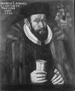 Andreas Laubmajer, Gemälde in der Professorengalerie Tübingen